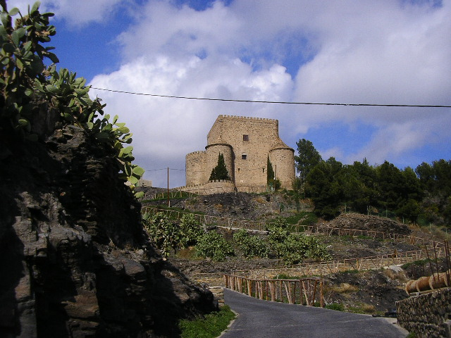 Castillo de Gérgal, en Almería (España)